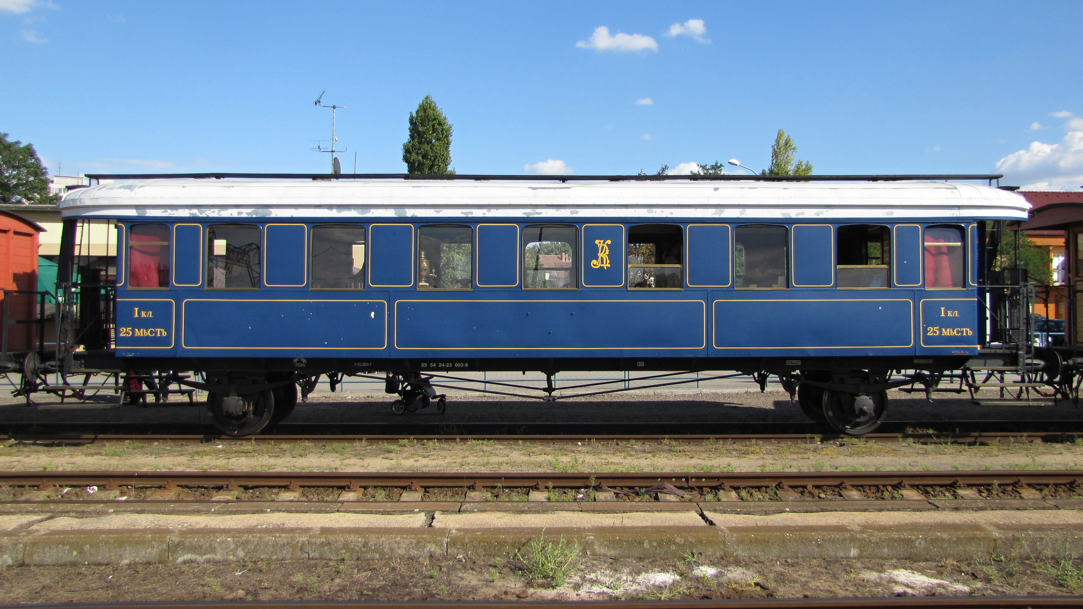 Putovní muzeum Legiovlak na železniční stanici Kyjov